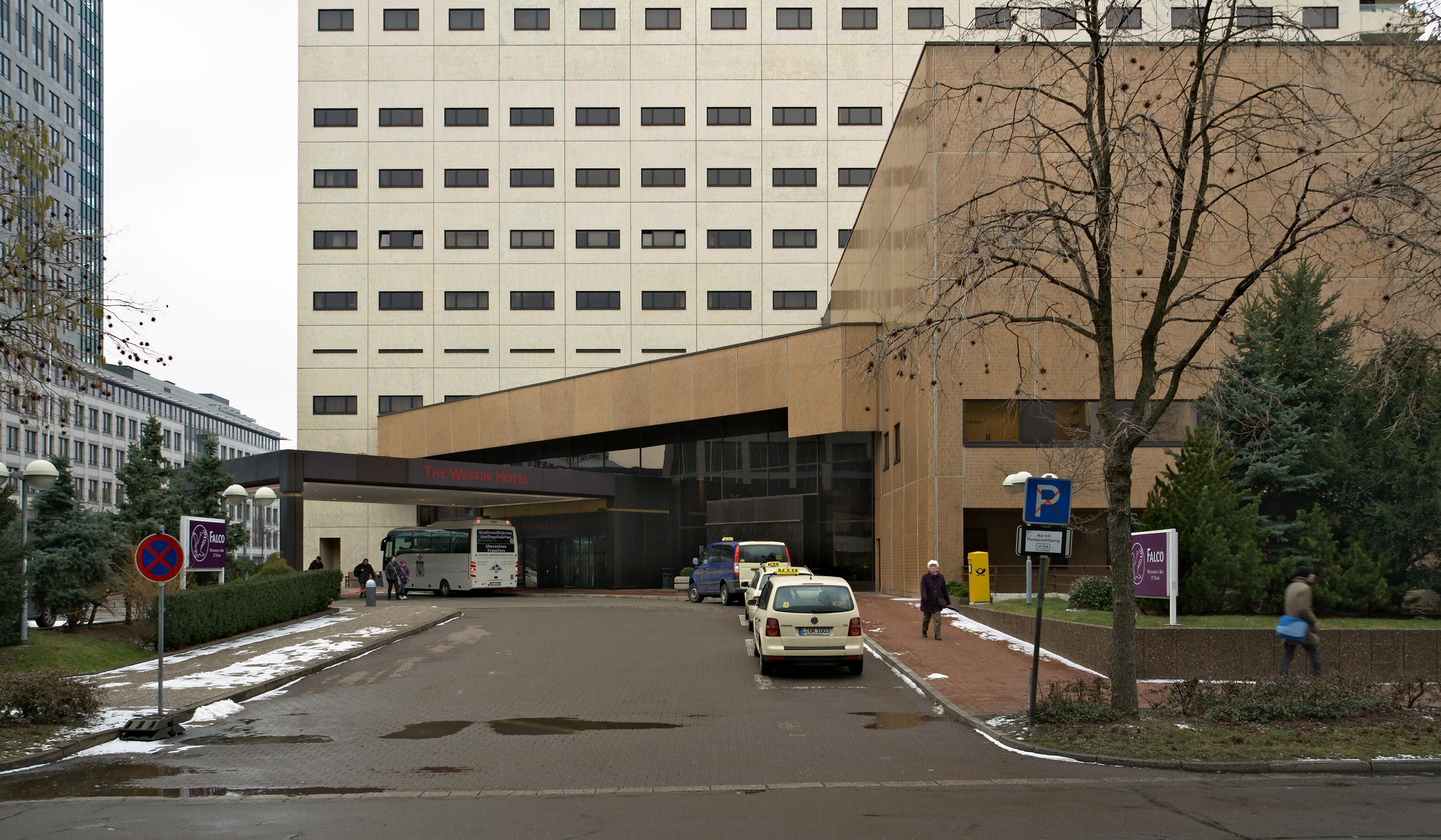 Eingangsbereich The Westin Hotel, Leipzig 2011.